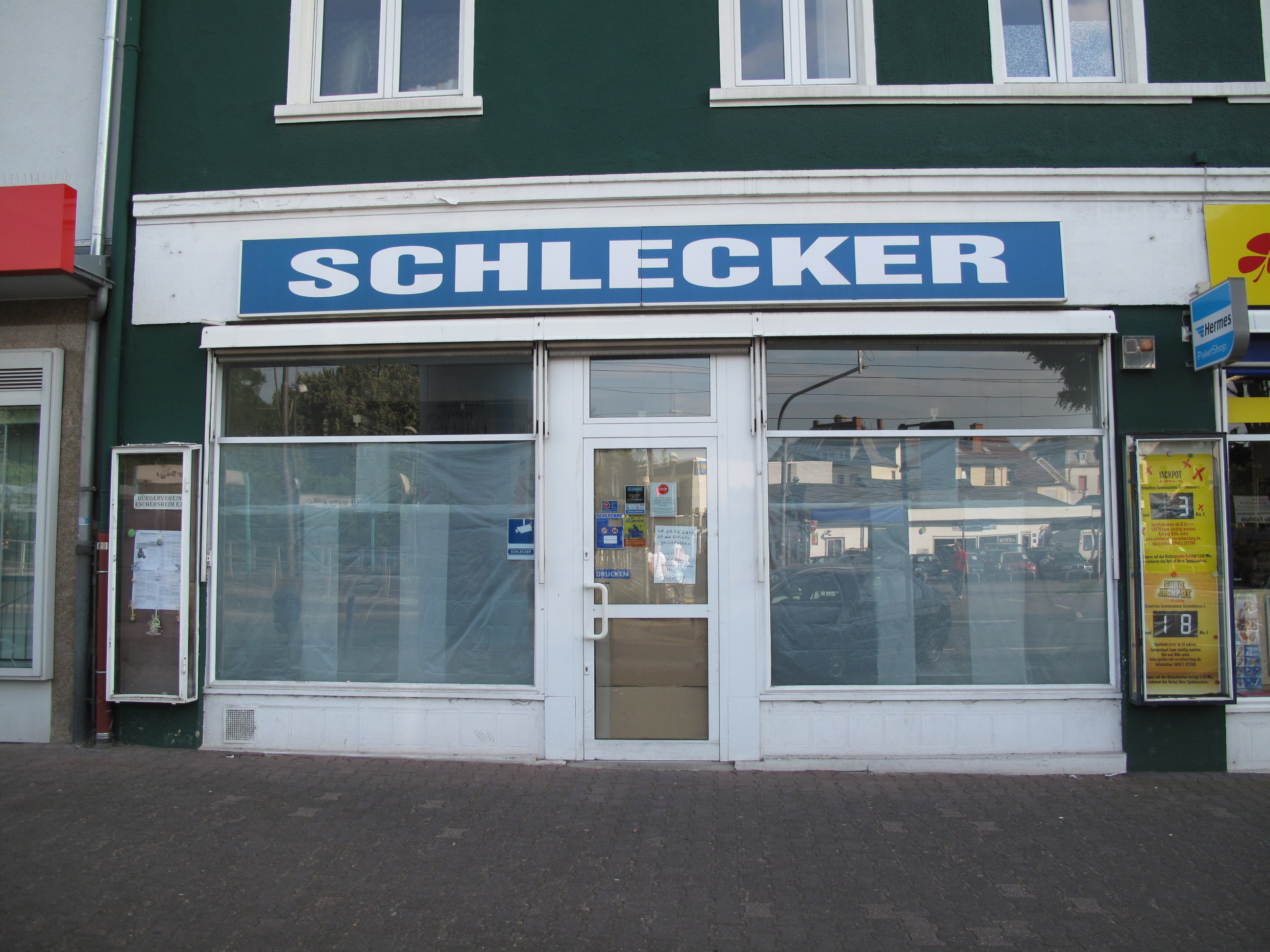 Geschlossene Schlecker-Filiale, 60431 Frankfurt am Main, Am Weißen Stein 17